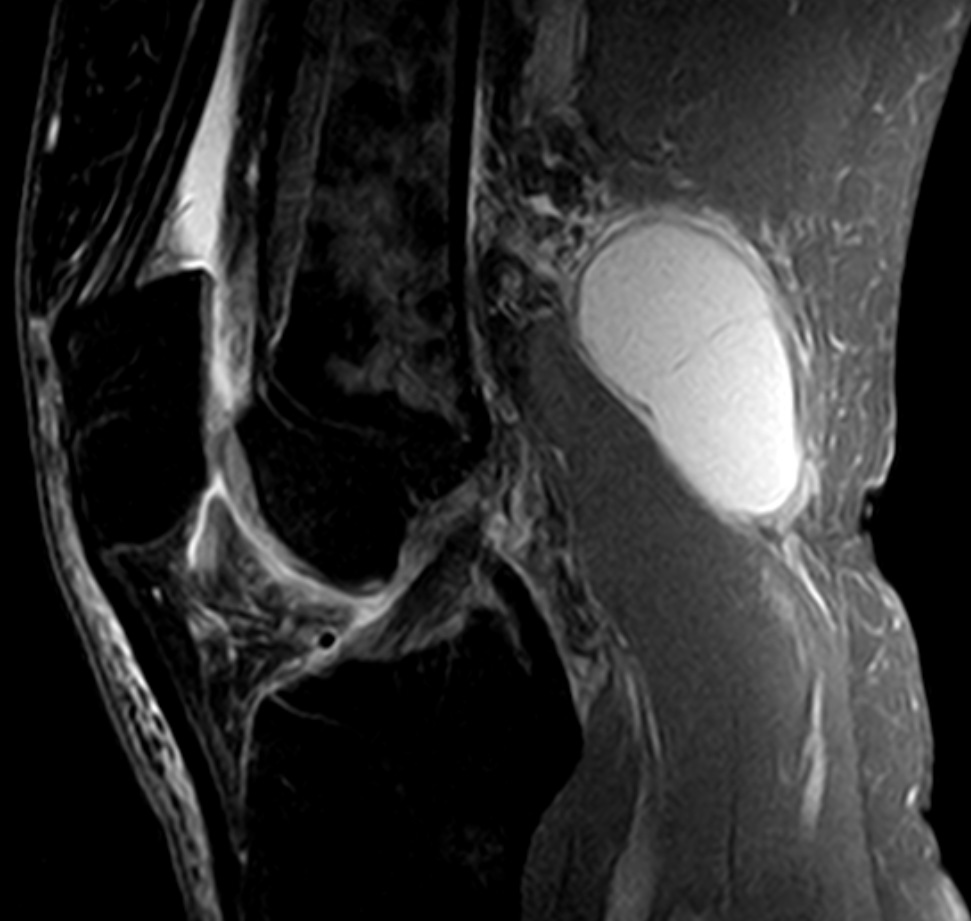 Bakerzyste MRT sagittal. Verbindung zum Gelenk nicht mit abgebildet.